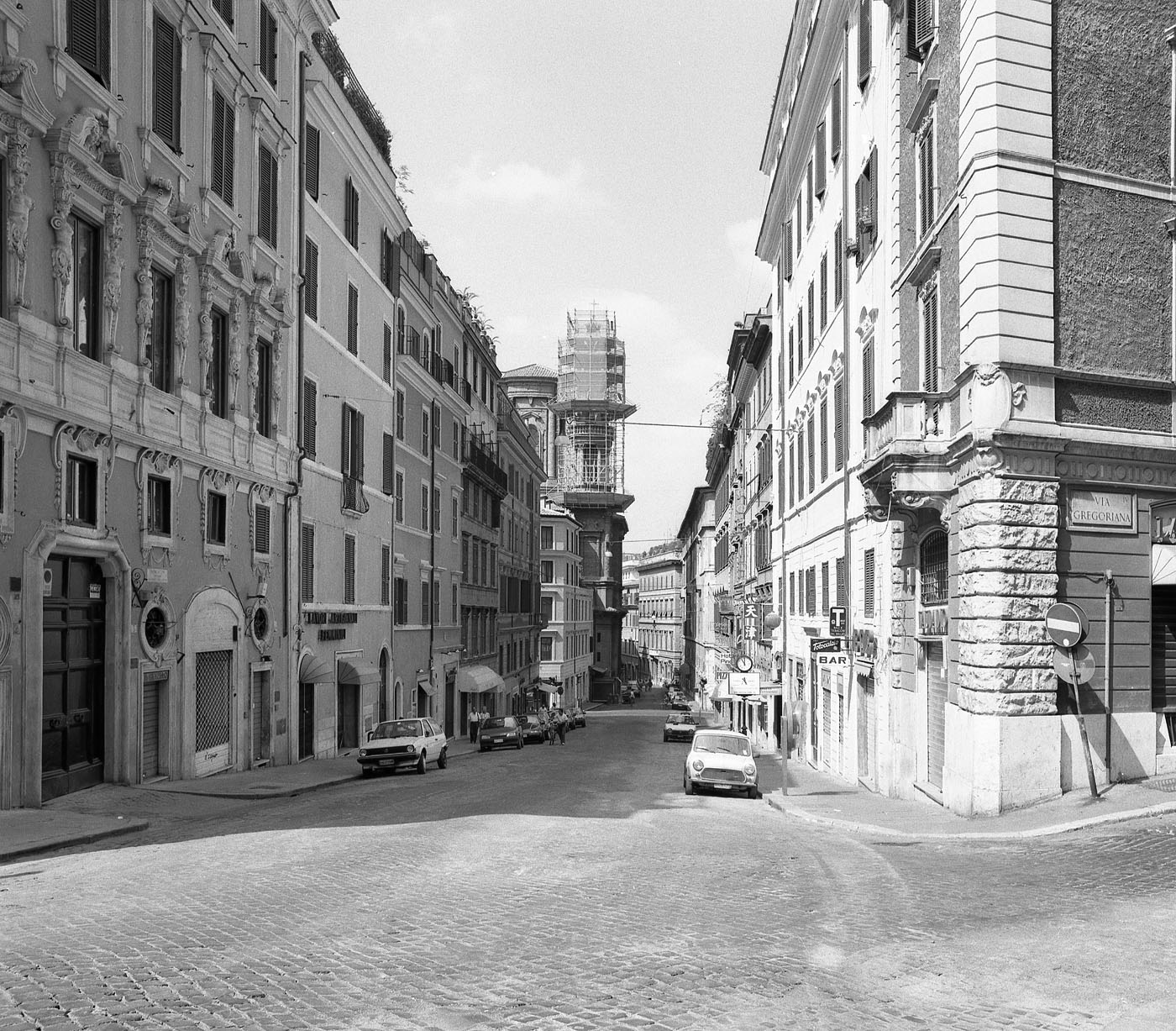 Via Capo le case Roma (1991)